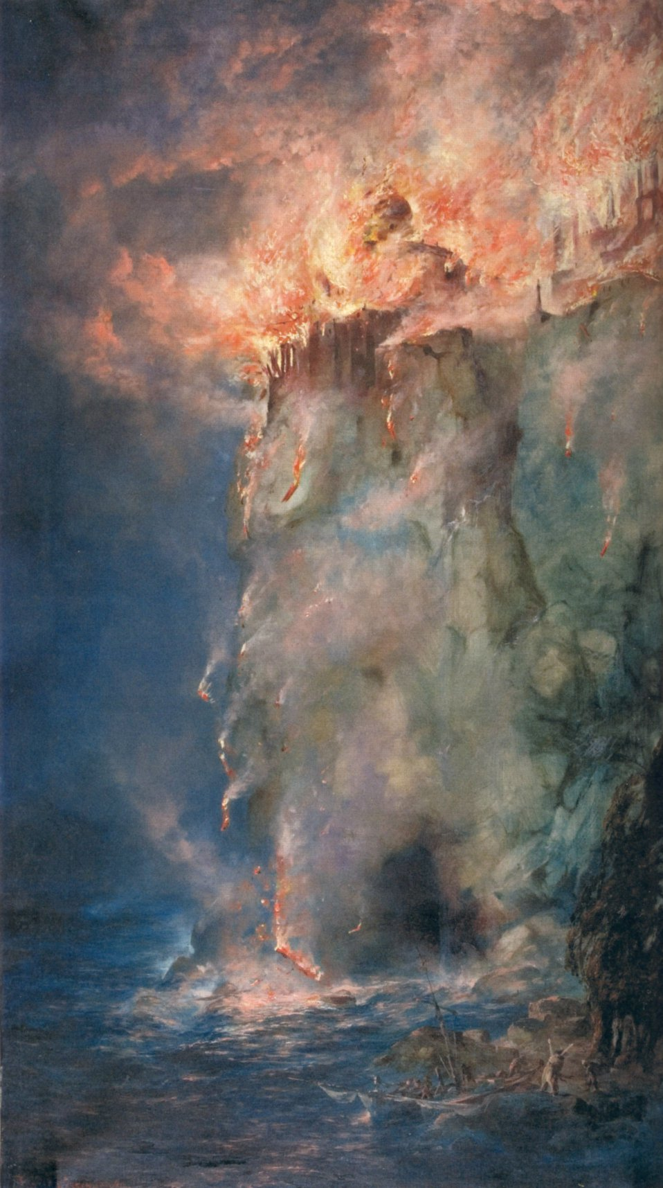 Brennendes Schloss.label QS:Lde,"Brennendes Schloss."